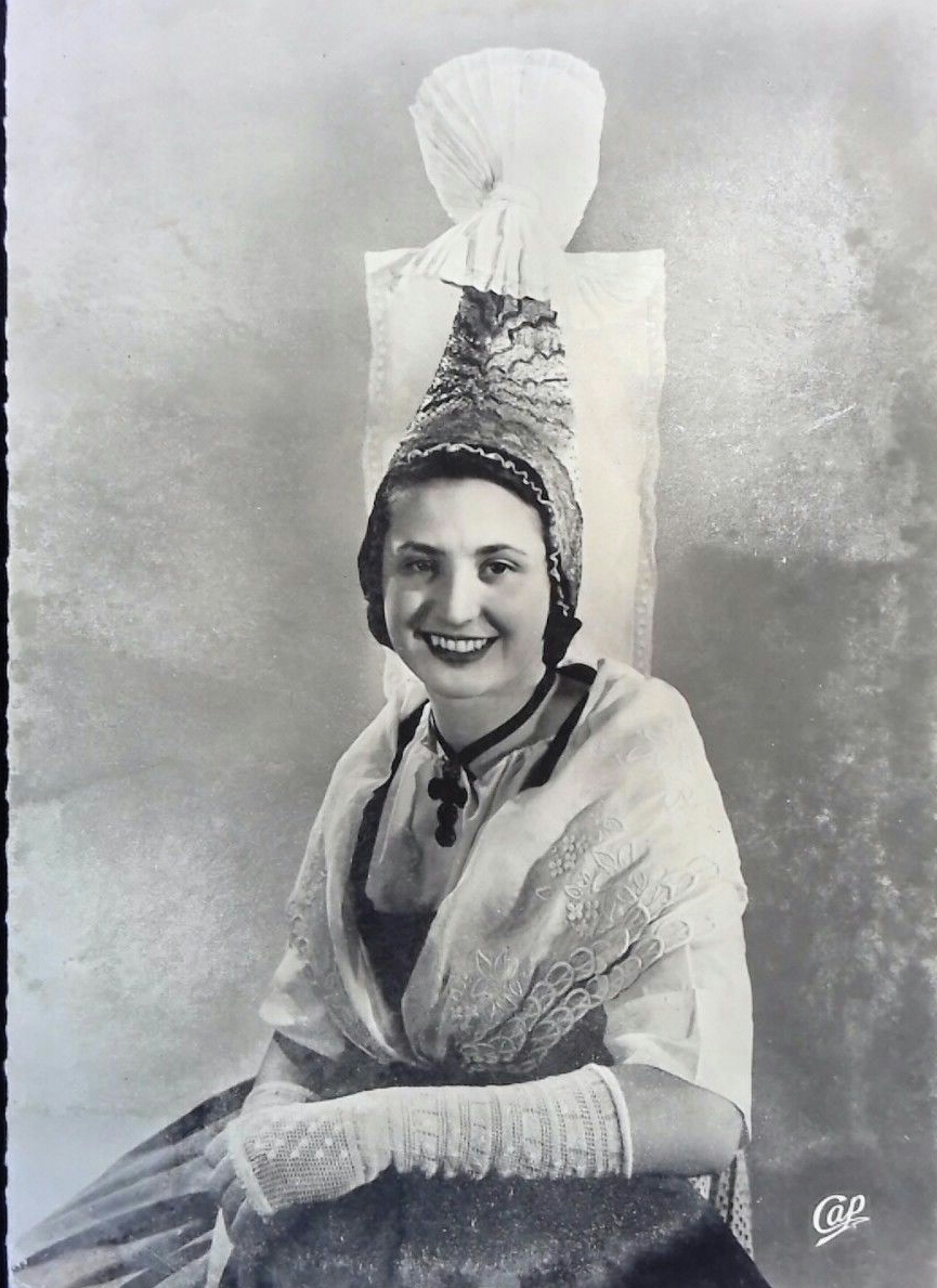 Bonnet cauchoix dans les années 1930.